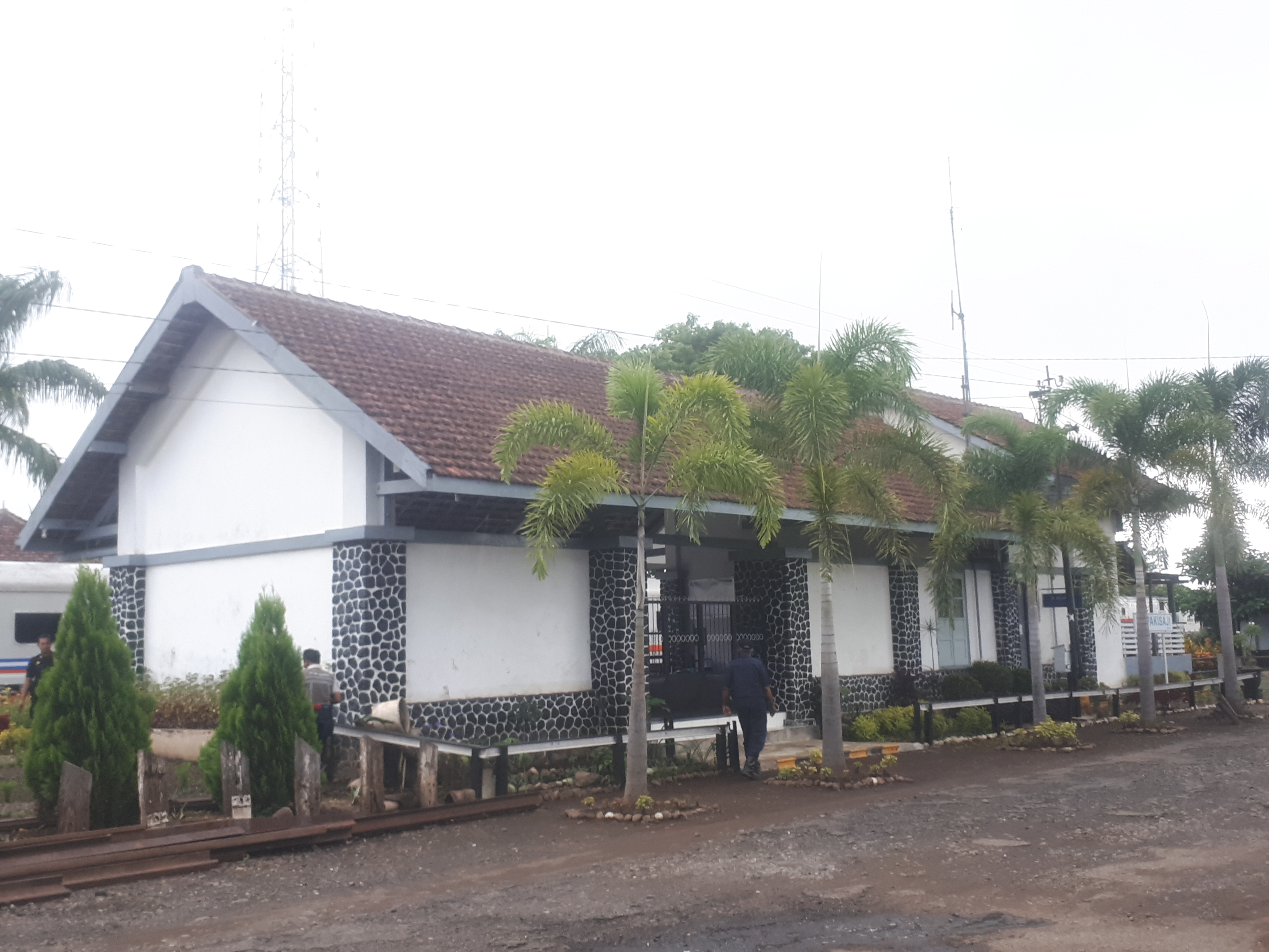 Tampak depan Stasiun Pakisaji pada tahun 2020